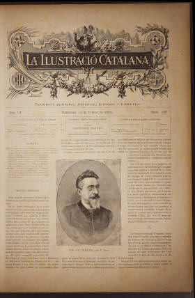 Ilustració Catalana, primera època, número 128. Data: 15 de Febrer de 1885, pàg. 33. Retrat de J.M. de Pereda, per Pacià Ross.